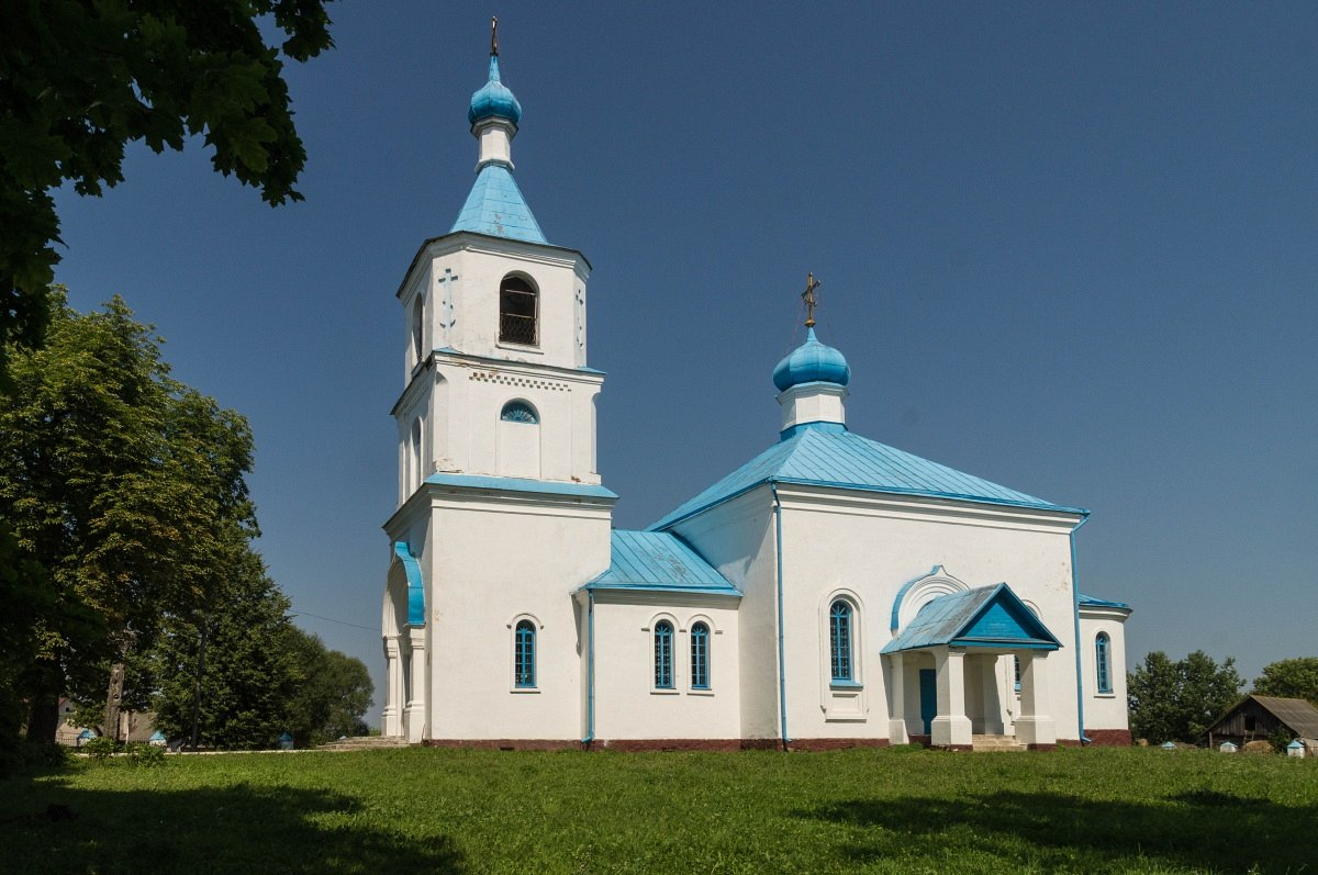 Чарневічы. Царква Св. Параскевы